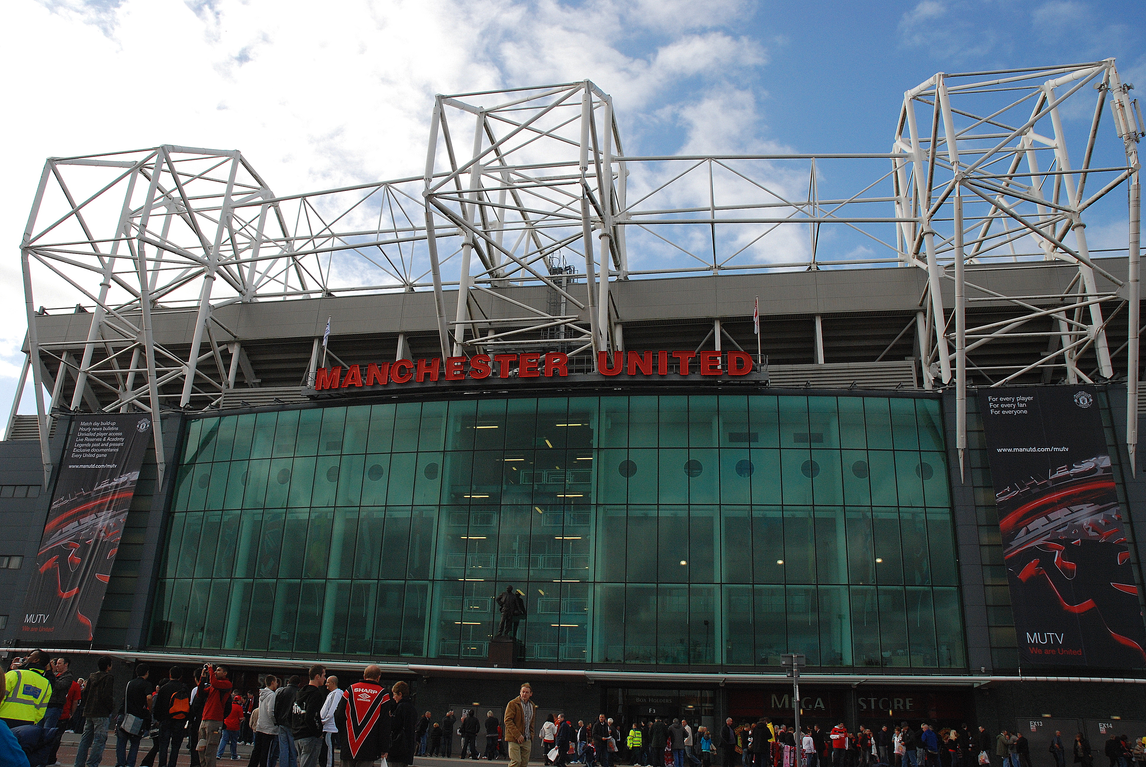 Het voetbalstadion van Manchester United in Manchester, Engeland